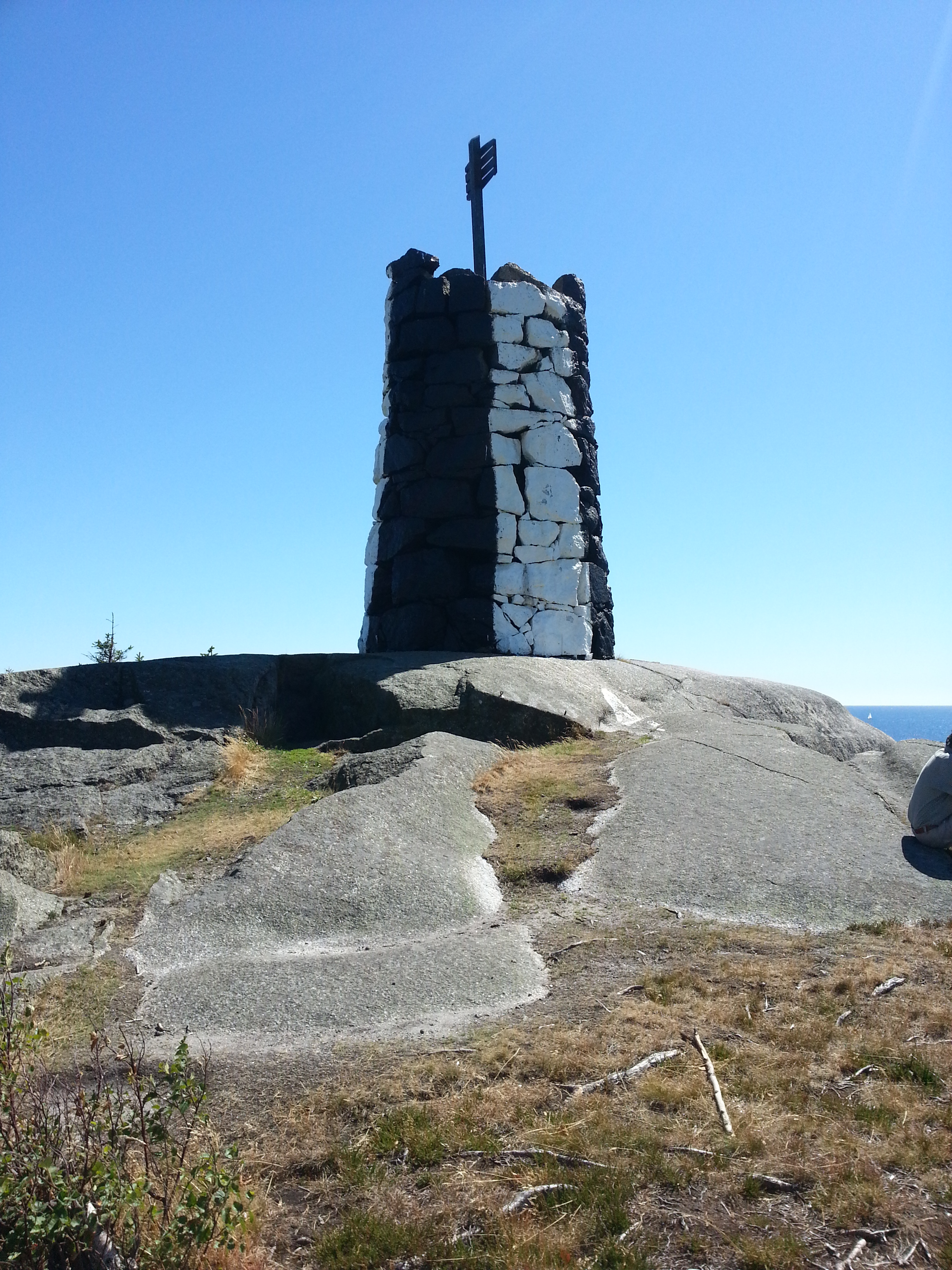 Tønsberg tønne, Sandefjord, Norway